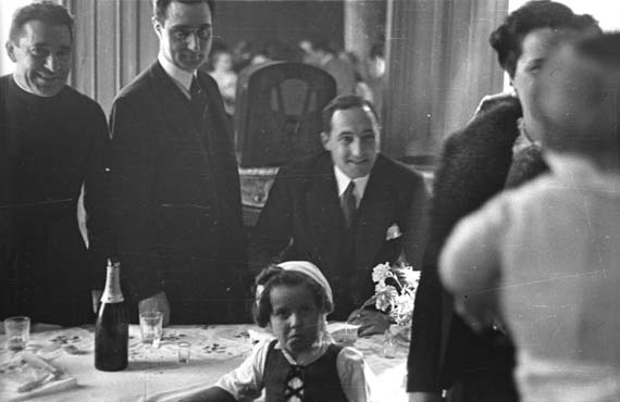 Agirre Lehendakaria seme-alabekin batera - The Lehendakari Agirre with his son and daughter.